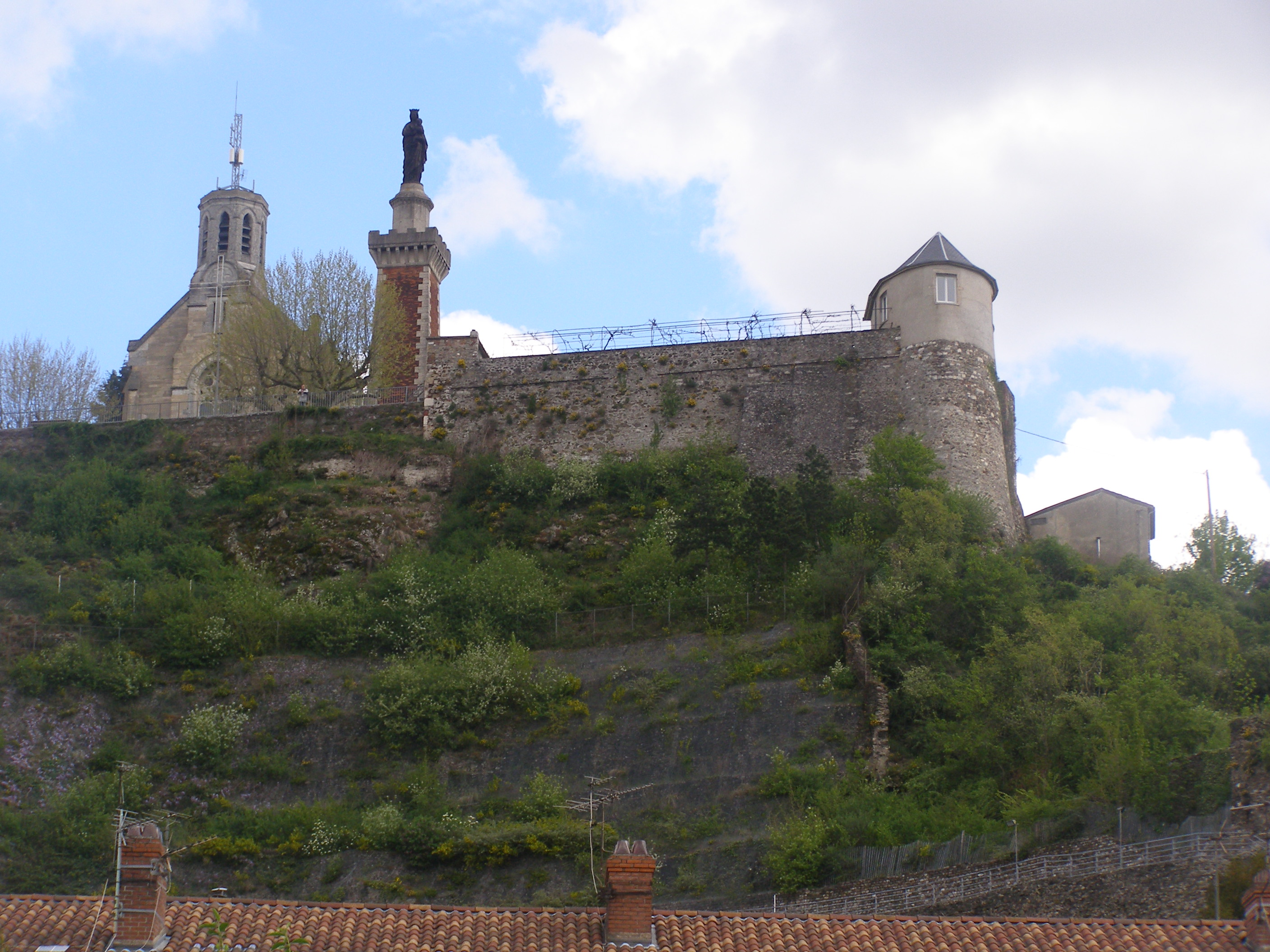 Chapelle et vierge sur la colline de Pipet